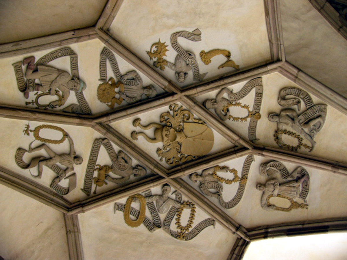 Ornamentschmuck am Deckengewölbe des Himmelkroner Kreuzgangs mit Hinweisen auf 16 Ordenszugehörigkeiten